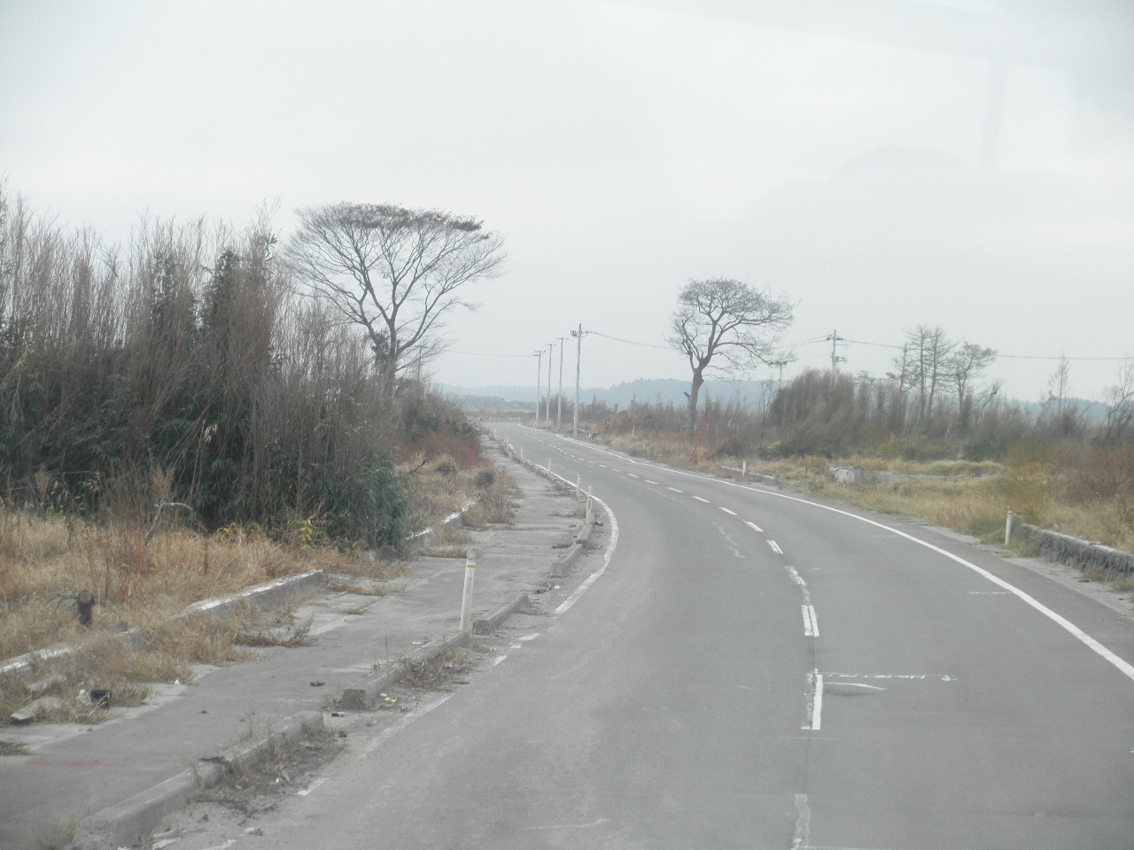 宮城県亘理郡山元町高瀬笠野 福島県道・宮城県道38号相馬亘理線